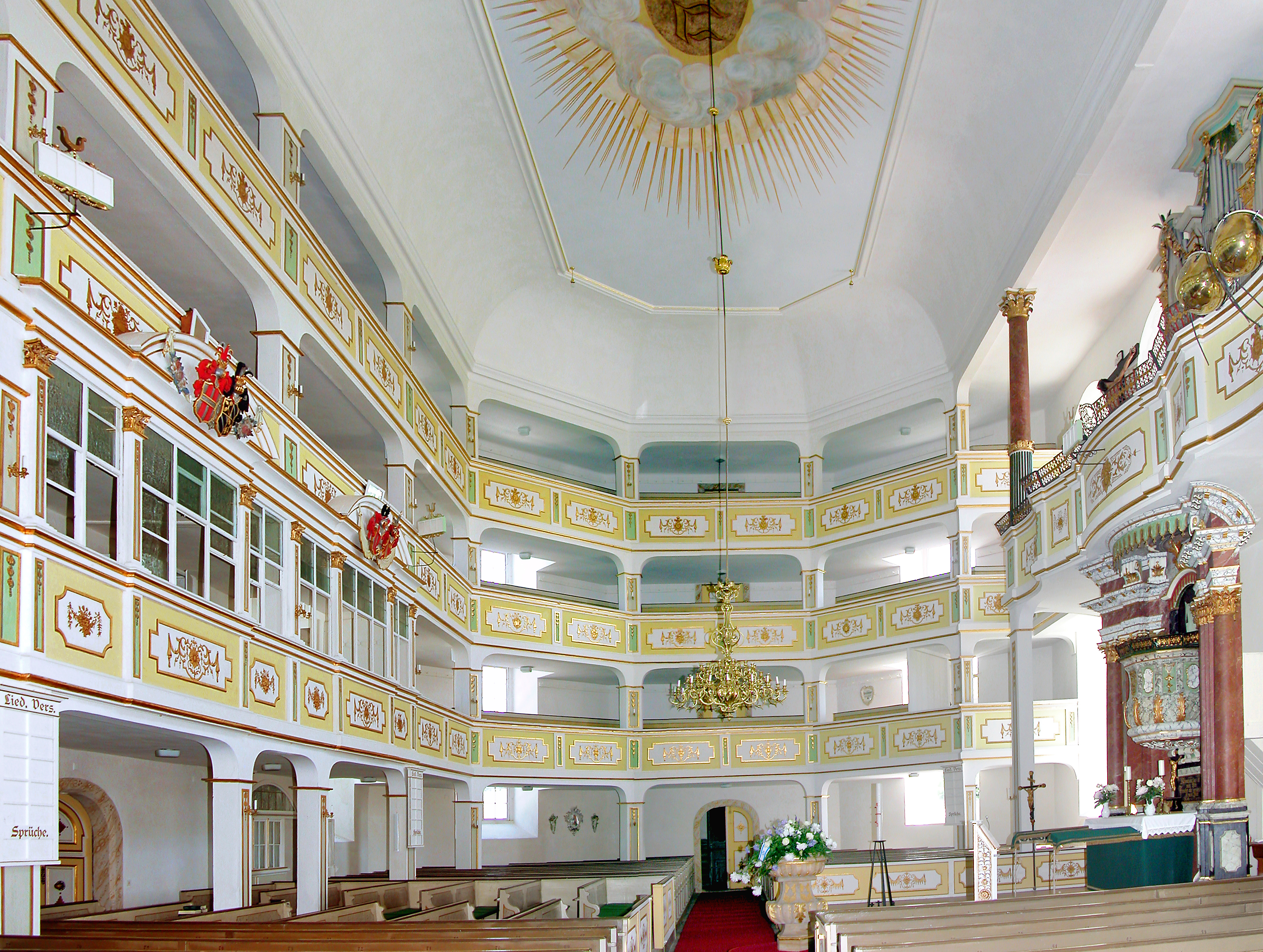 22.06.2008 01738 Pretzschendorf (Klingenberg), Freiberger Straße (GMP: 50.871572,13.524186): Barocke Dorfkirche (1732-1734 von J. Christian Simon), gestreckter, achteckiger Grundriß. [DSCN33185-33186.TIF]20080622105MDR.JPG(c)Blobelt